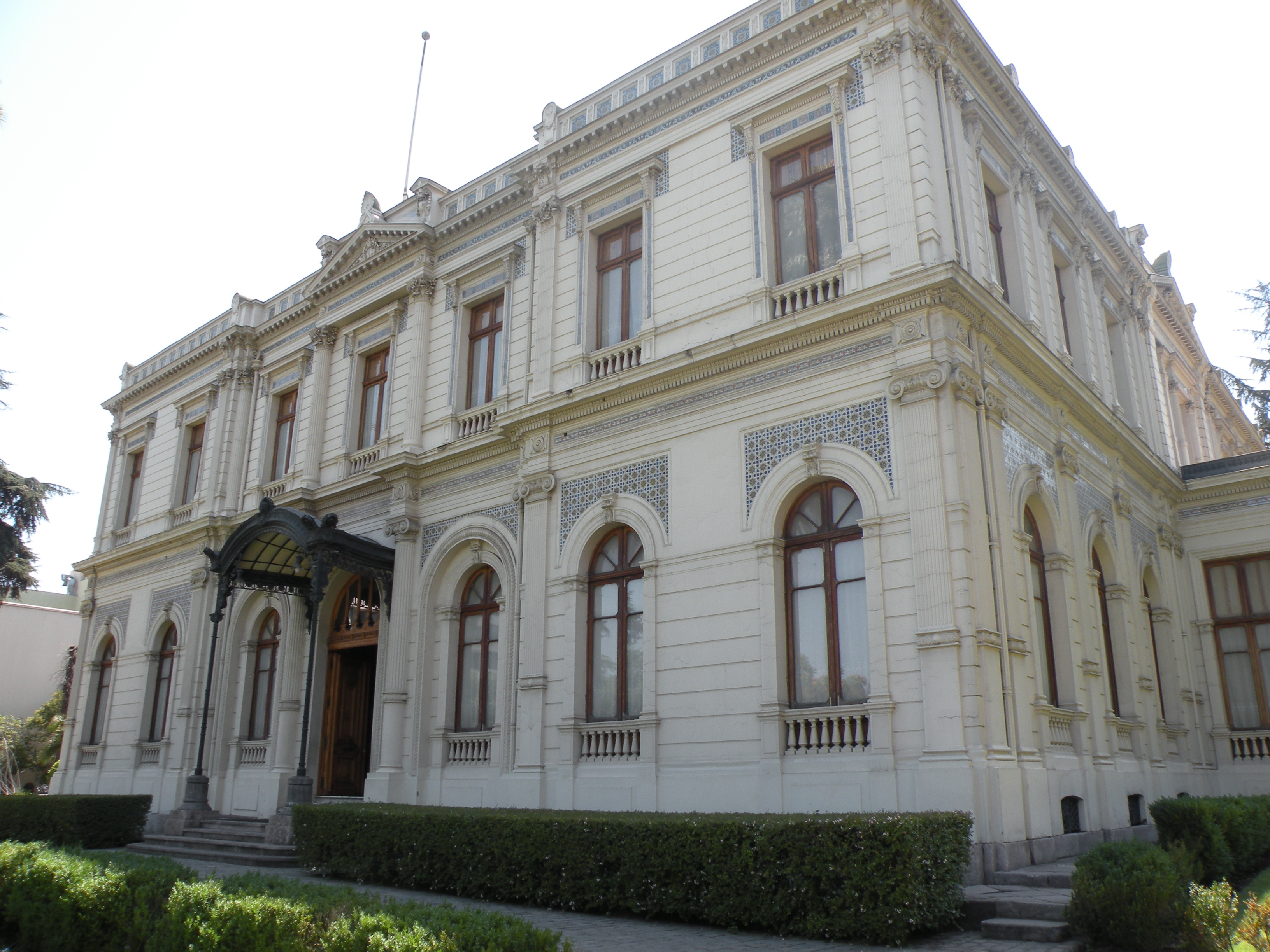 Palacio Cousiño, actual museo del mismo nombre, solía ser la residencia de Matías Cousiño.